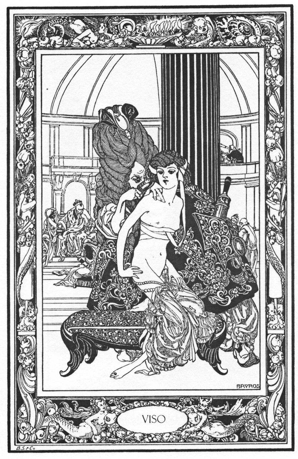 Illustration for Giambattista Basile's "Pentamerone".